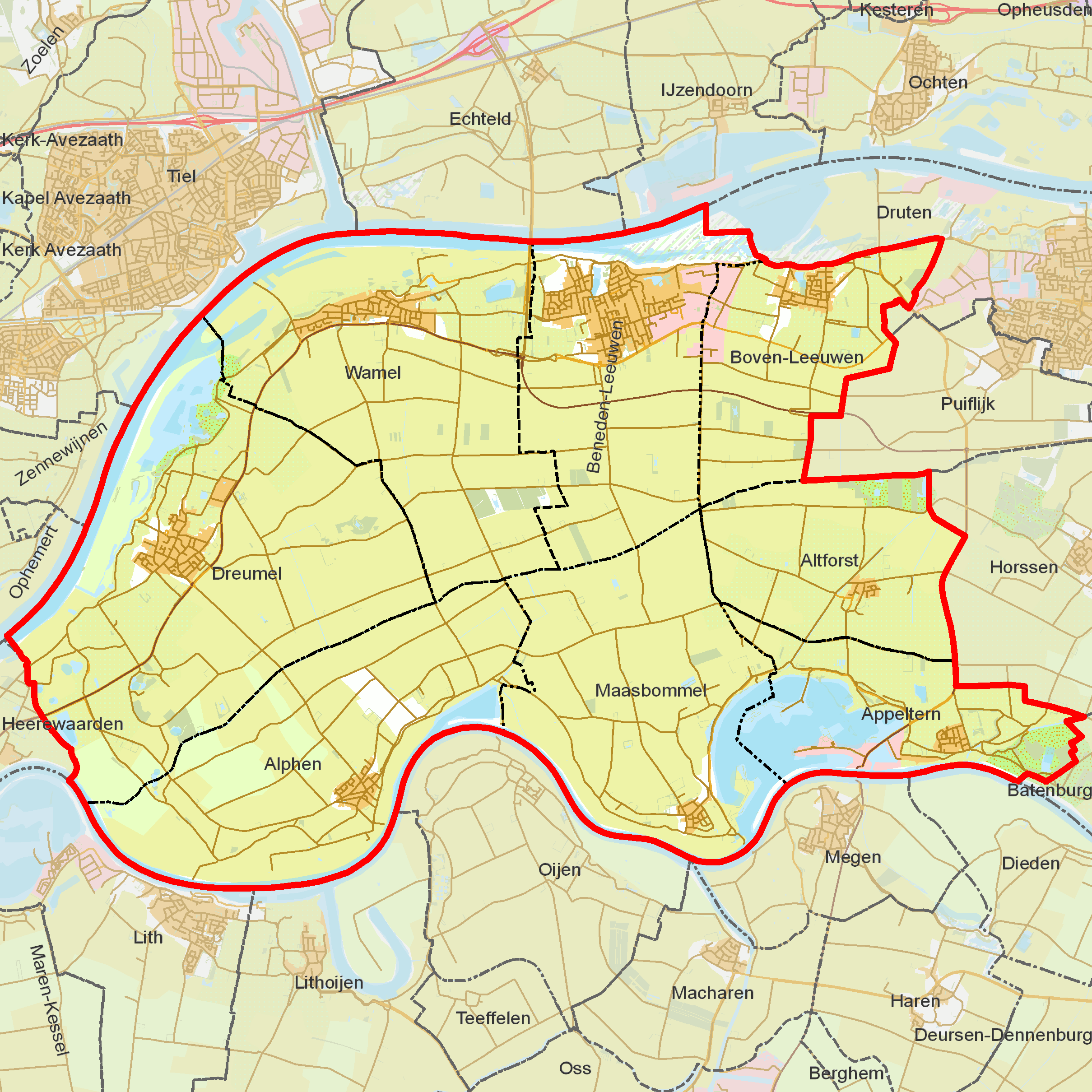 BAG woonplaatsen - Gemeente West Maas en Waal.png